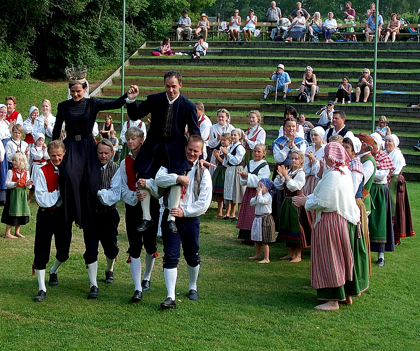 Fredrik August Dahlgrens folklustpel Värmlänningarna 2010 framfört i Gropen Ransäter Värmland Sverige med Henrik Hugo i rollen som Erik